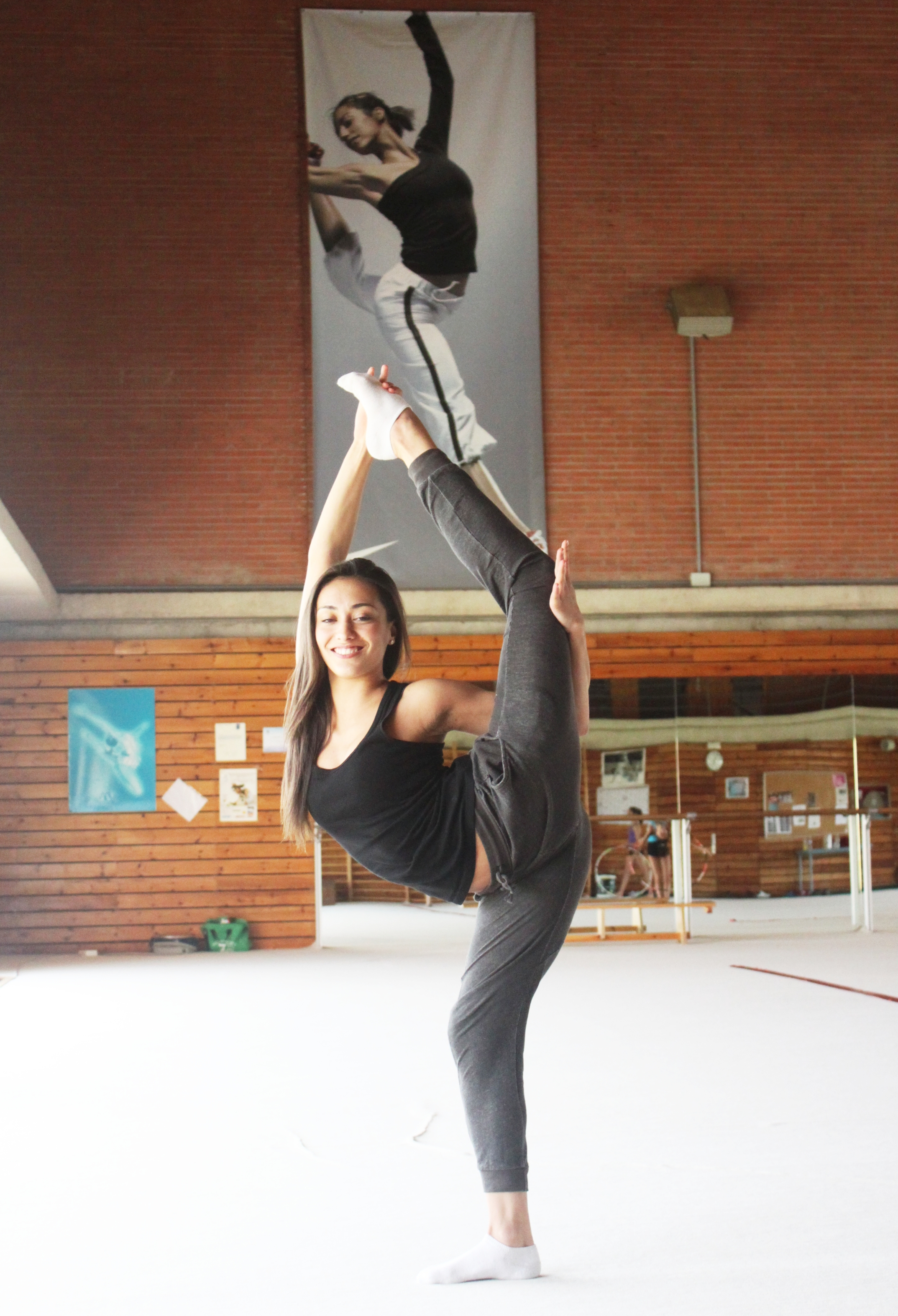 La gimnasta española Natalia García Timofeeva en el CAR de San Cugat en 2013.